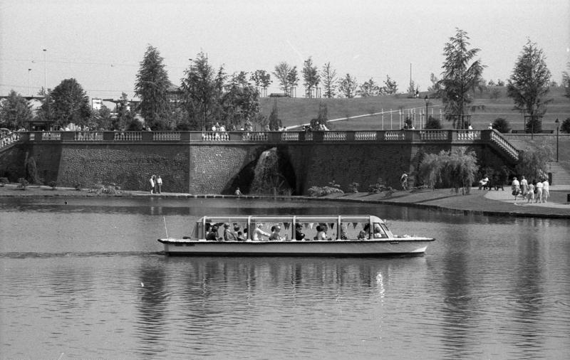 Bundesgartenschau in Bonn.